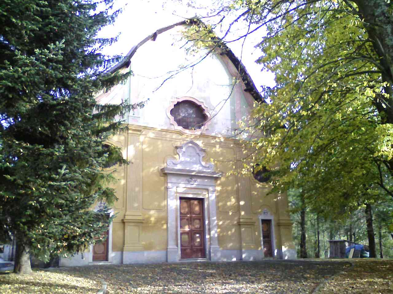 Chiesa di san Giovanni Battista in Sassello (Italy)